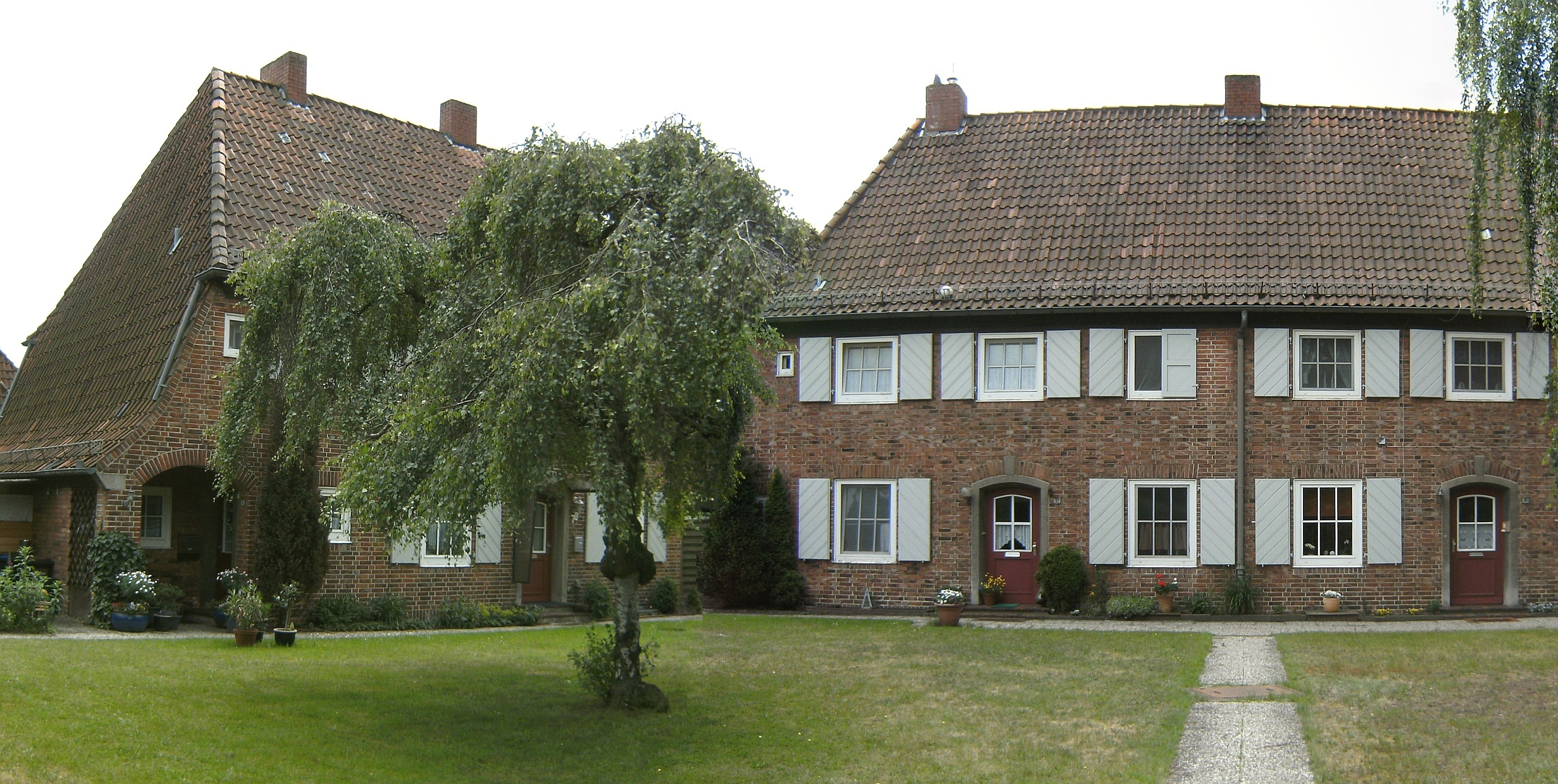 Werkswohnanlage des Bremer Vulkan in Bremen, Fröbelstraße 76-78-80-82-84 Die Gesamtanlage ist ein geschütztes Kulturdenkmal in der Freien Hansestadt Bremen, mit der Nr. 2225 beim Landesamt für Denkmalpflege registriert.